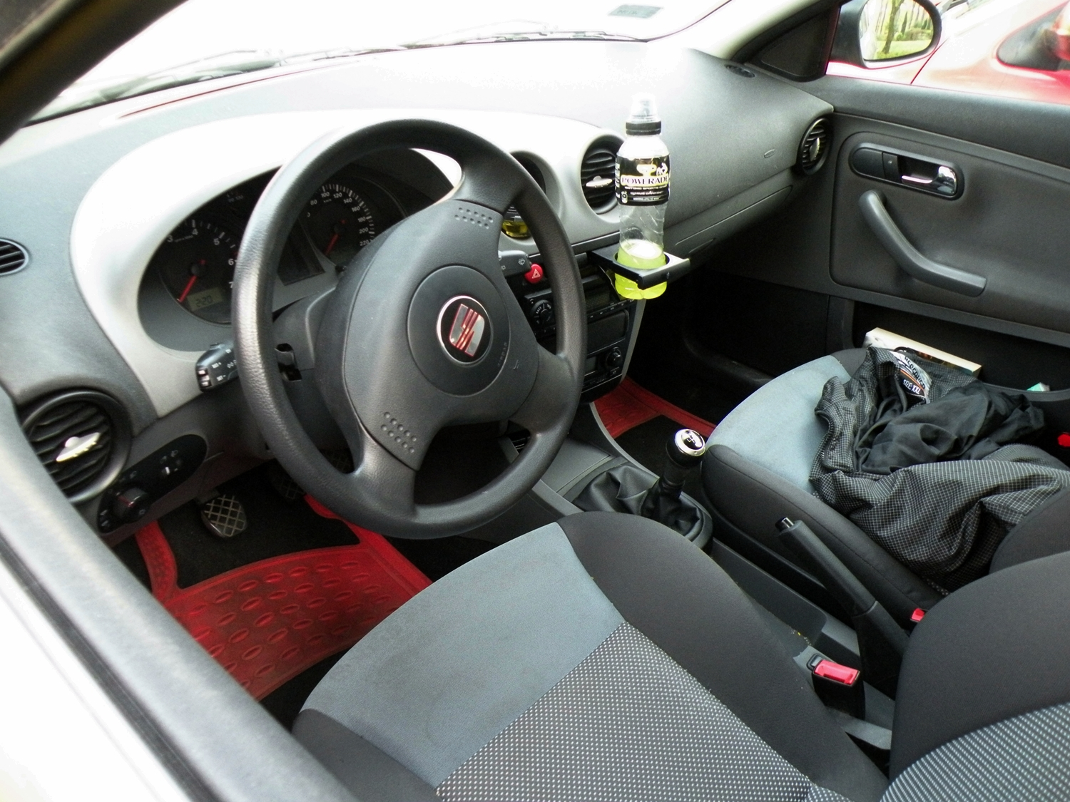 SEAT Ibiza Mk3 interior